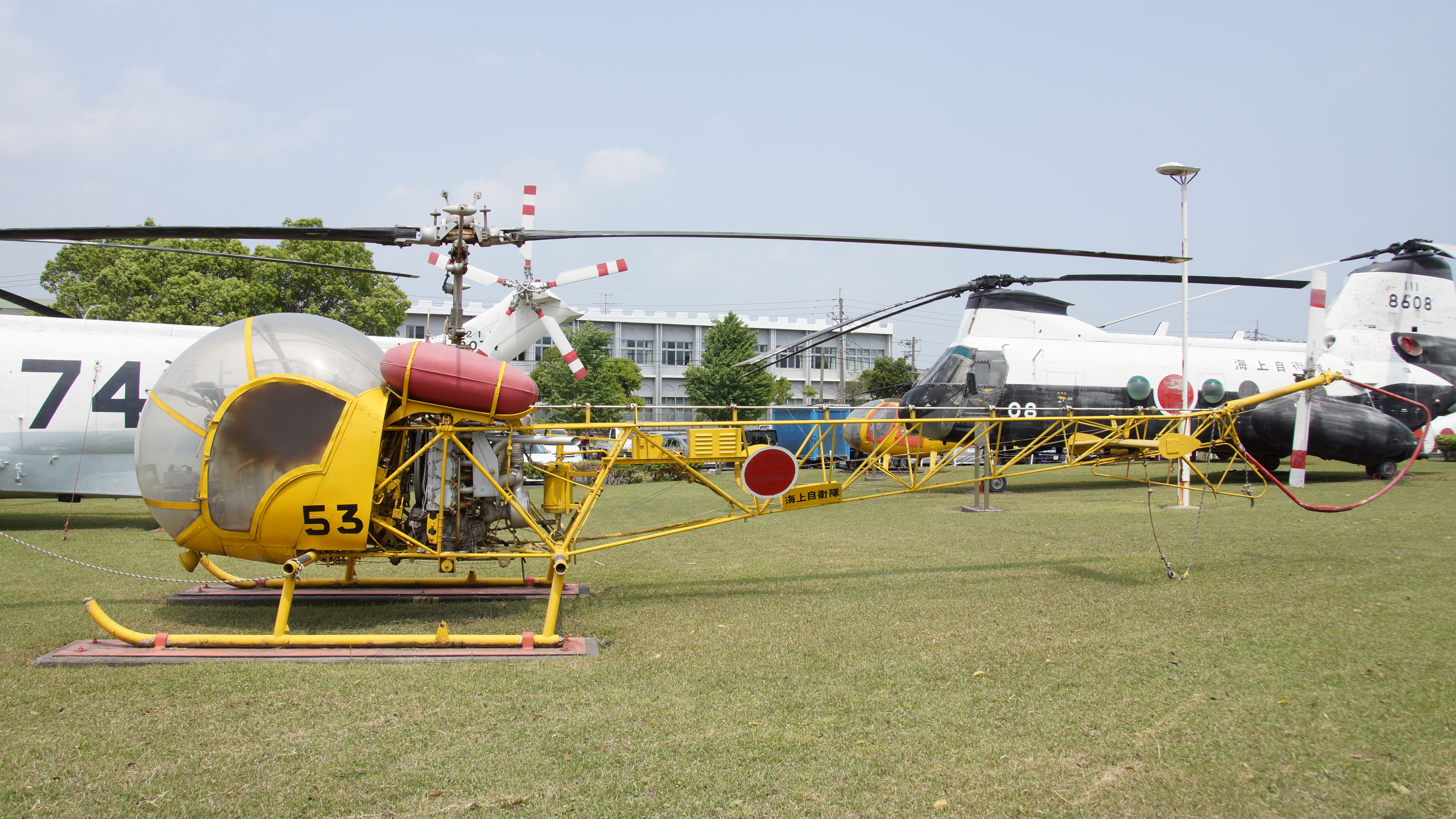 海上自衛隊 川崎ベル47G-2A（8753号機） 左側面。2017年4月29日 海上自衛隊鹿屋航空基地史料館にて。